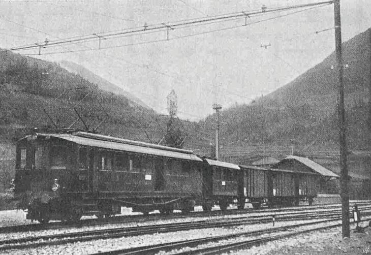 Gemischter Zug der Chemin de fer Martigny–Orsières (MO) aus der Eröffnungszeit